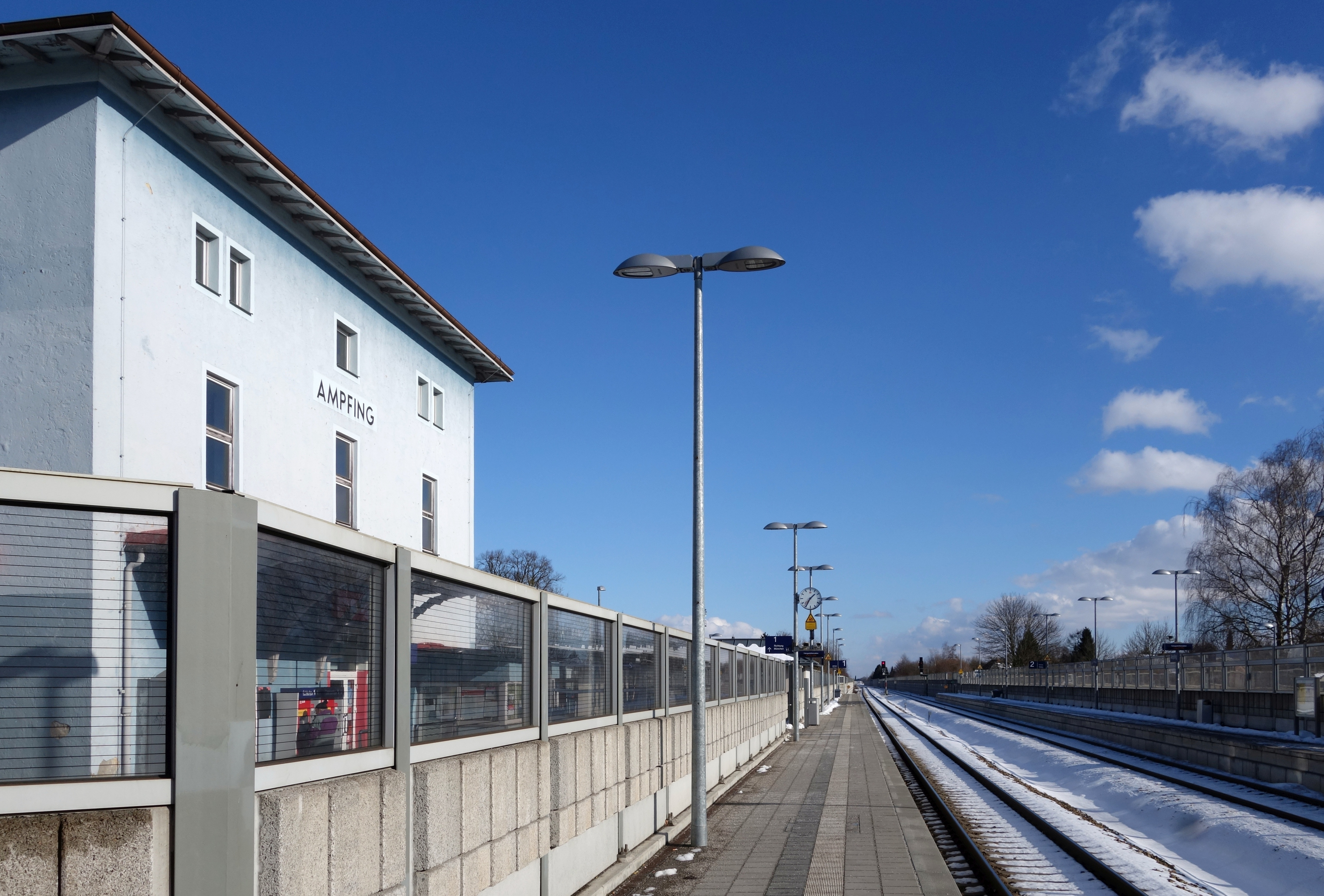 Bahnhof Ampfing, Nordbahnsteig Blickrichtung Mühldorf, Januar 2015